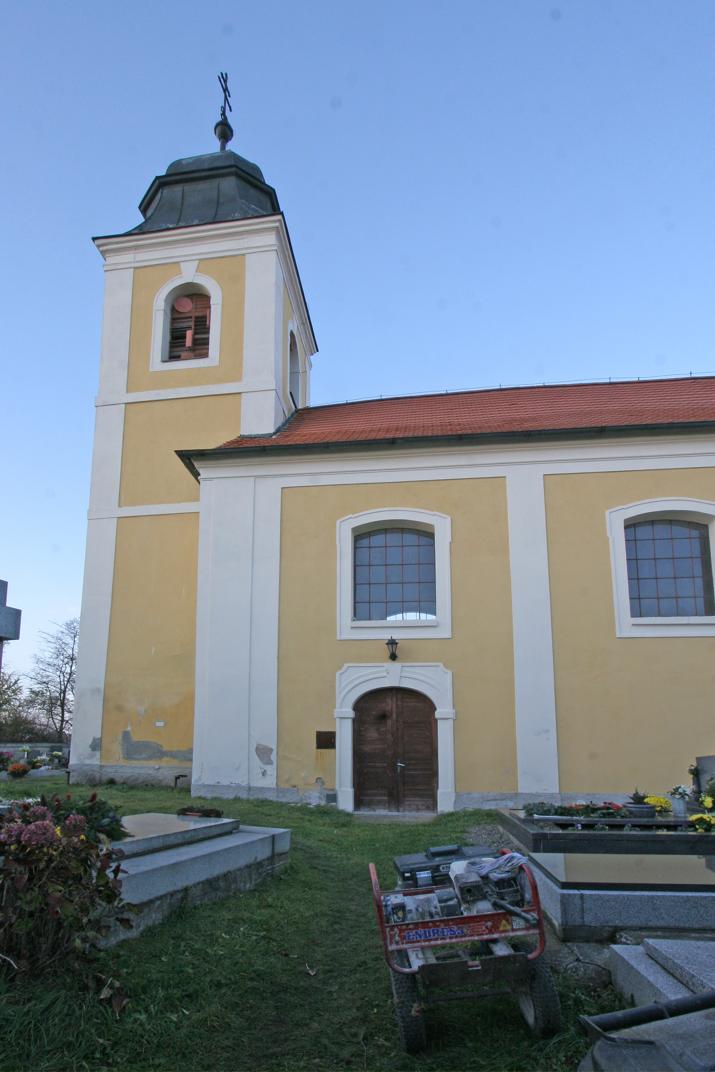 Kostel sv. Václava (Horky), Horky